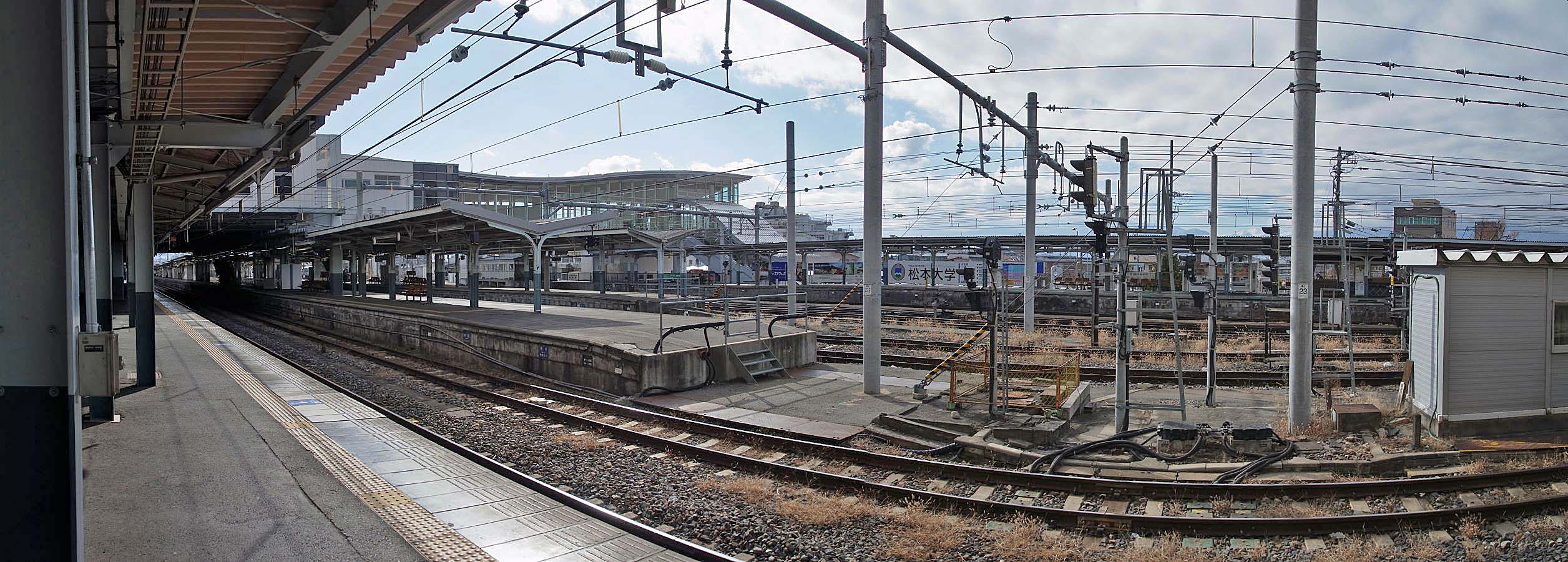 JR Matsumoto sta. , JR松本駅